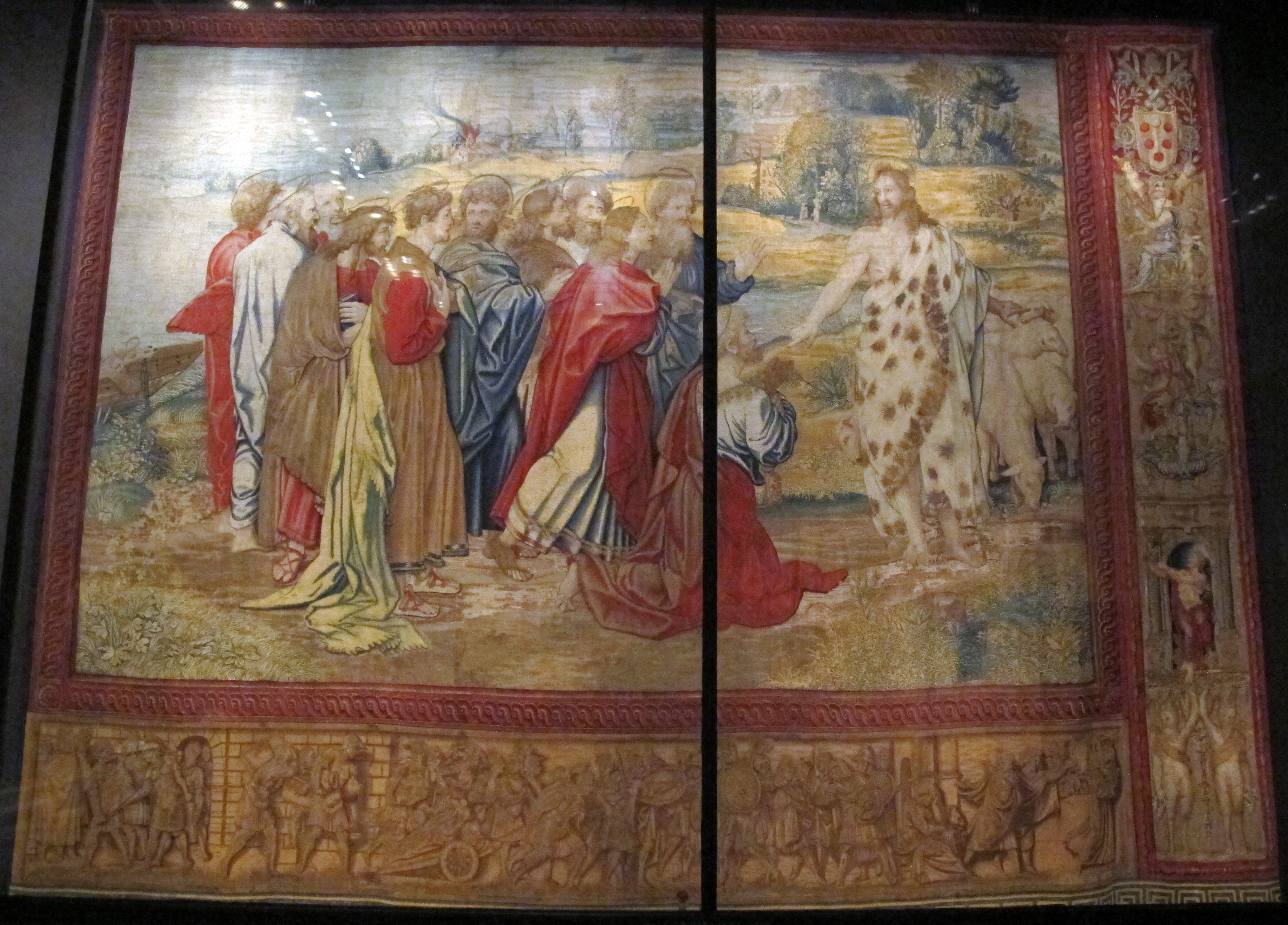 Pinacoteca Vaticana